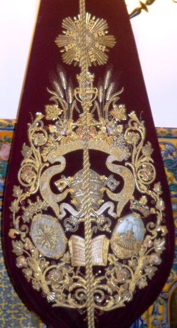 Escudo que aparece en el bacalao de la Hermandad